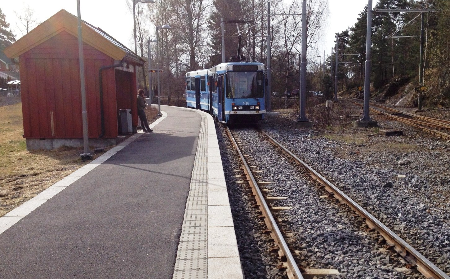 Ljabru, endeholdeplass på Ekebergbanen, Oslo